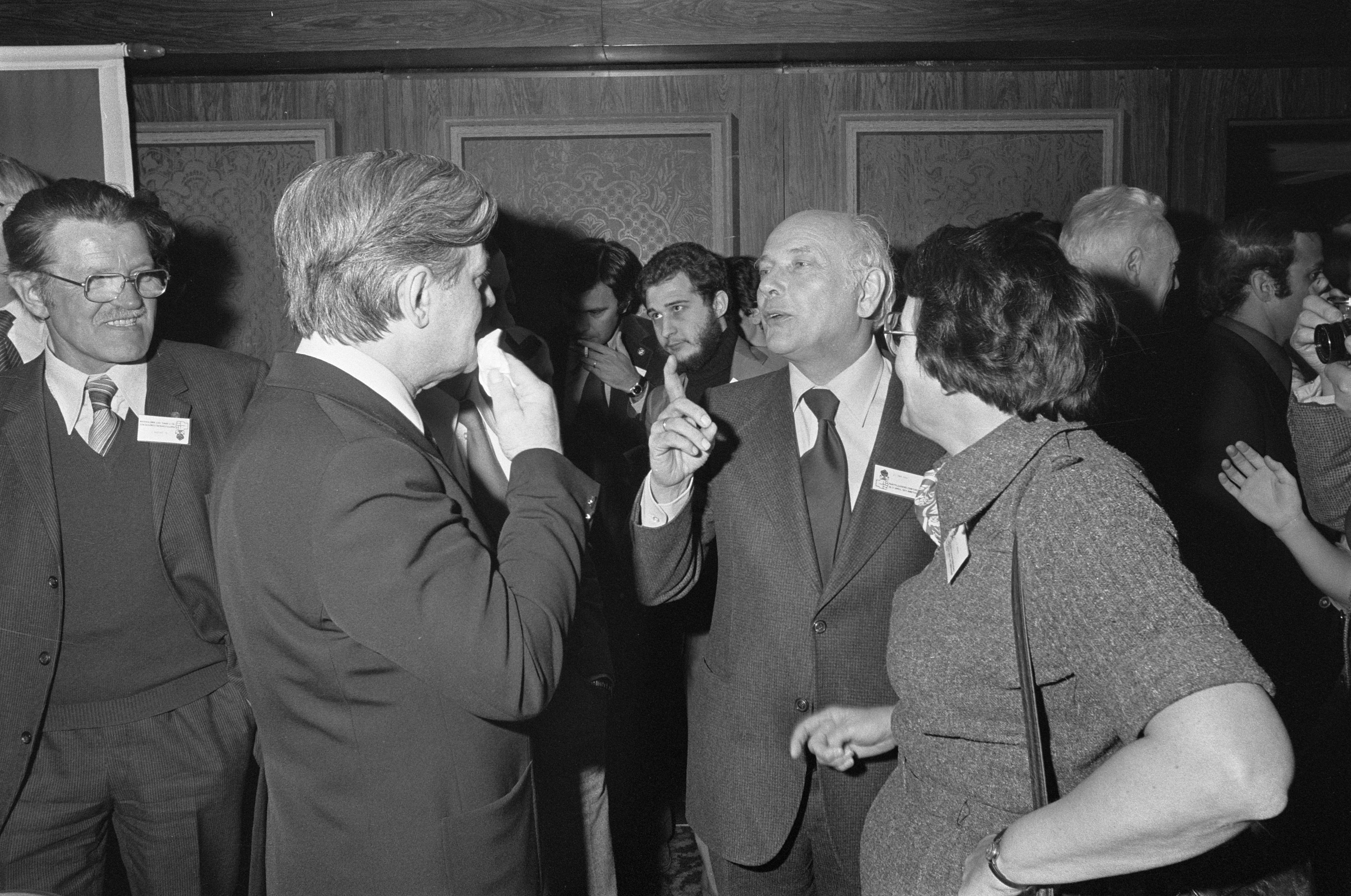 Collectie / Archief : Fotocollectie Anefo Reportage / Serie : Conferentie van Europese socialistische leiders in het Marriot Hotel in Amsterdam Beschrijving : De Nederlandse PvdA-leider Joop den Uyl in gesprek met de Duitse SPD-leider helmut Schmidt; PvdA-voorzitter Ien van den Heuvel luistert toe Datum : 16 april 1977 Locatie : Amsterdam, Noord-Holland Trefwoorden : conferenties, politici, politieke stromingen, socialisme Persoonsnaam : Heuvel, Ien van den, Schmidt, Helmut, Uyl, Joop den Fotograaf : Fotograaf Onbekend / Anefo Auteursrechthebbende : Nationaal Archief Materiaalsoort : Negatief (zwart/wit) Nummer archiefinventaris : bekijk toegang 2.24.01.05 Bestanddeelnummer : 929-1259